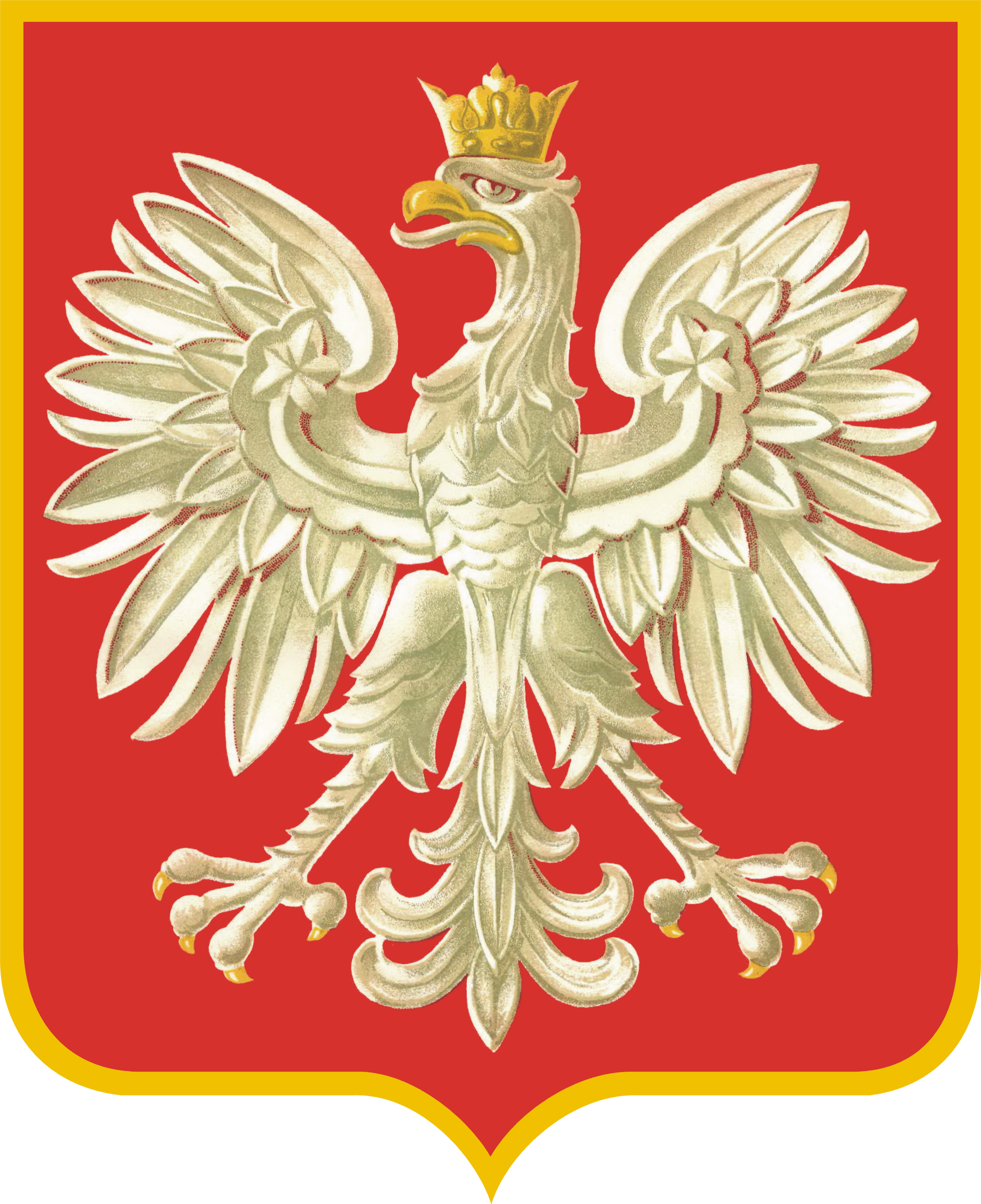 Godło Rzeczypospolitej Polskiej ustalone Rozporządzeniem Prezydenta Rzeczypospolitej z dnia 13 grudnia 1927 r. o godłach i barwach państwowych oraz o oznakach, chorągwiach i pieczęciach (Dz. U. z 1927 r. Nr 115, poz. 980)